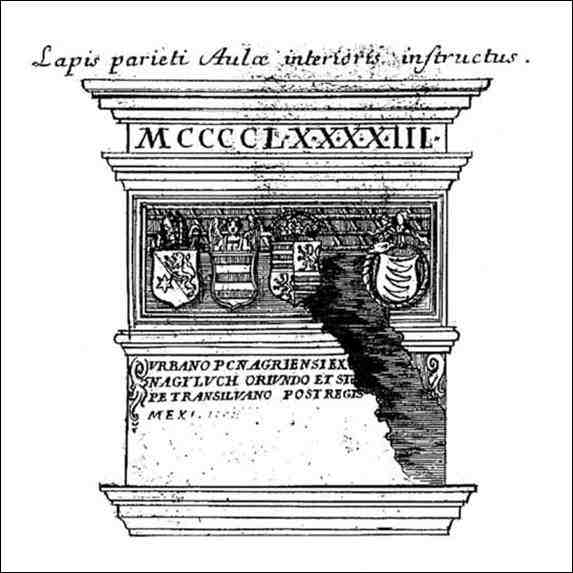 A koronaőrök címerével ellátott emléktábla (Visegrád)